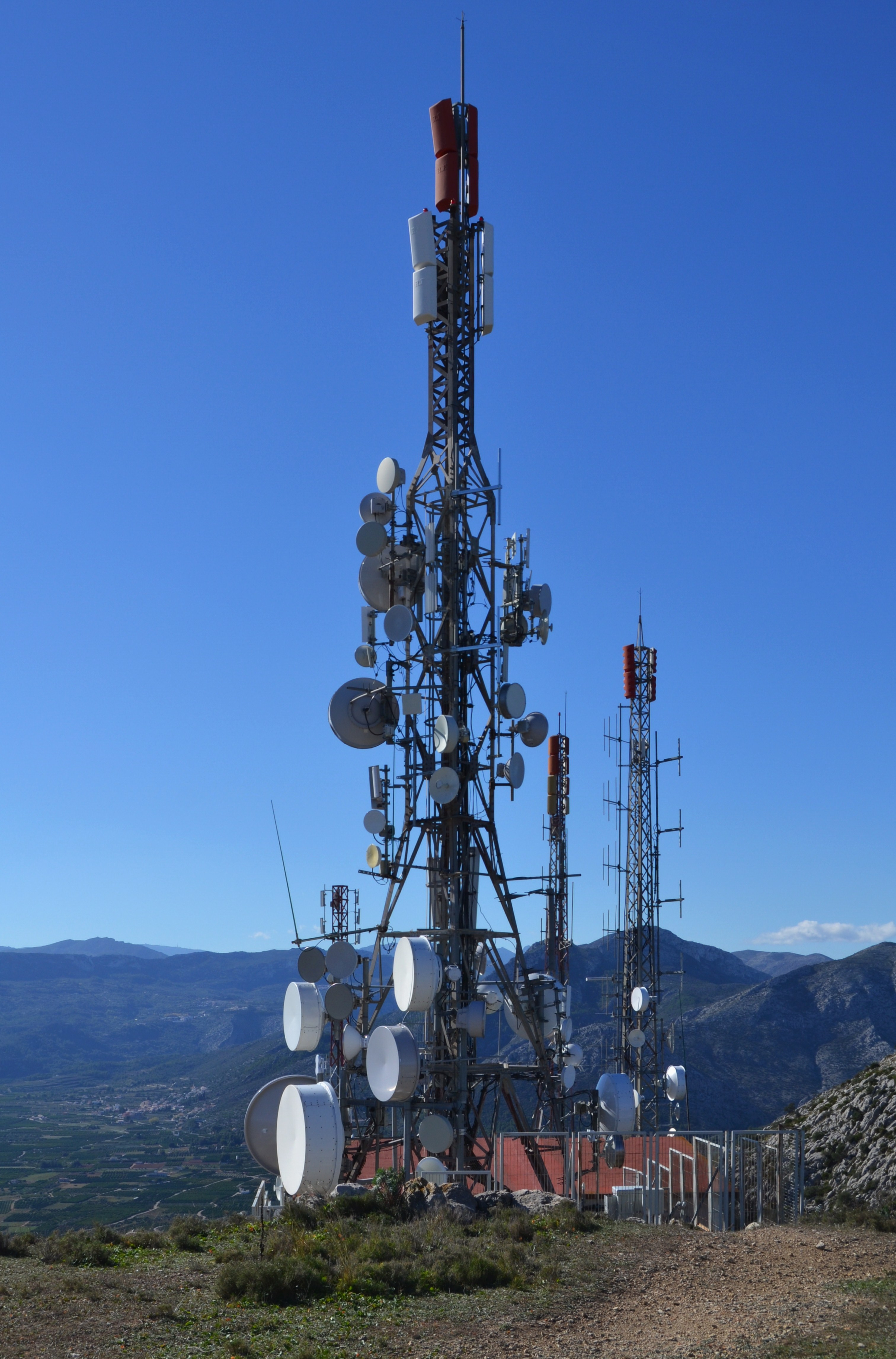 Serra de Segària, repetidors i antenes.